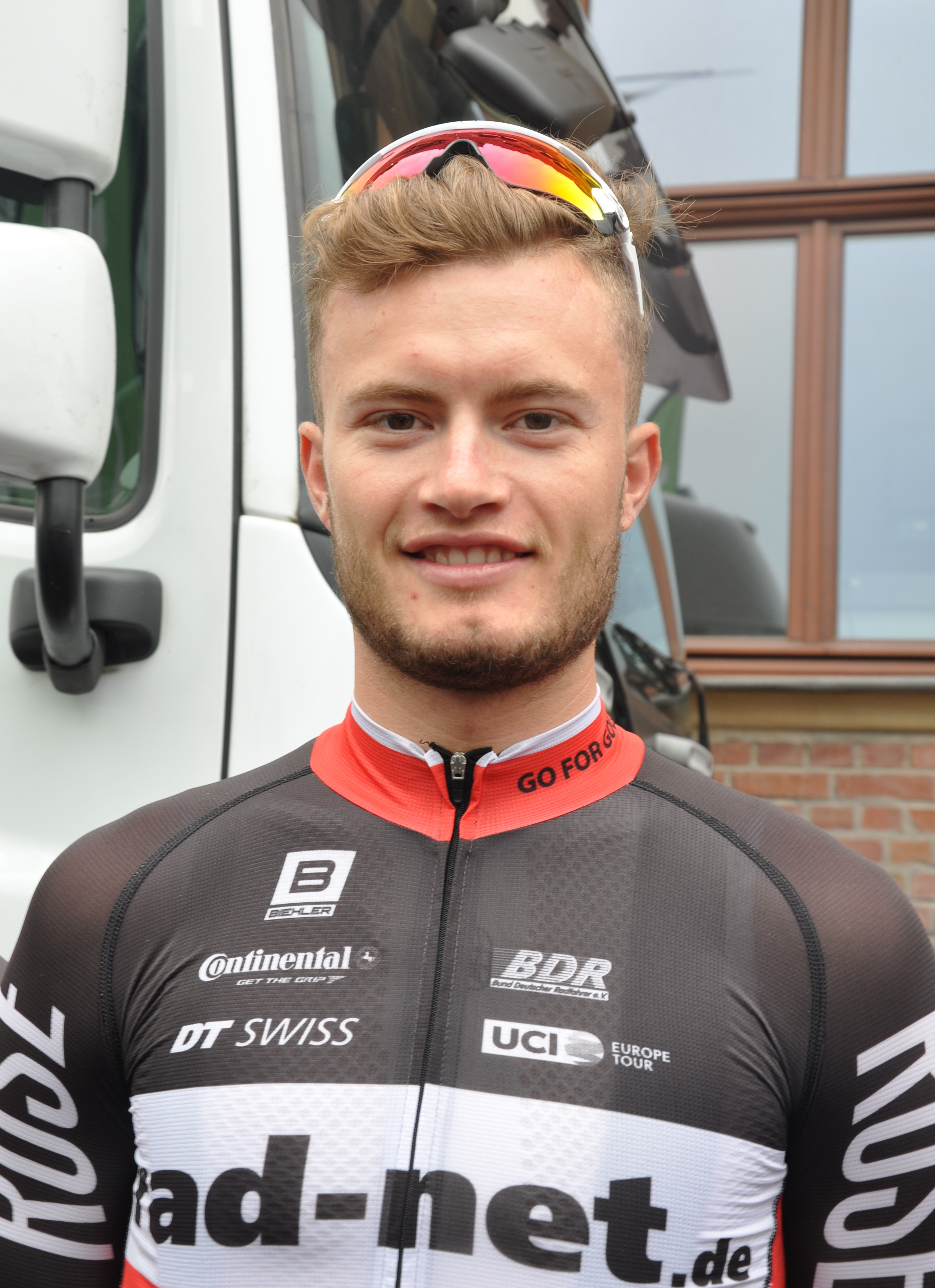 Marco Mathis, deutscher Radrennfahrer